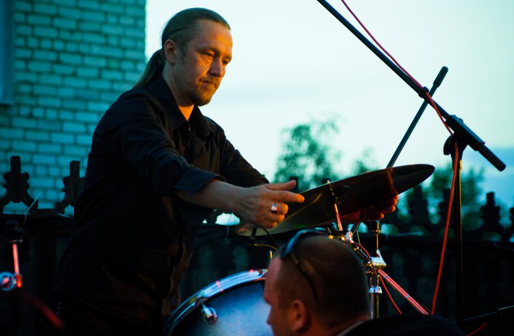 Олег Демидович. Концерт N.R.M. в городе Горки, 11 июня 2011 года